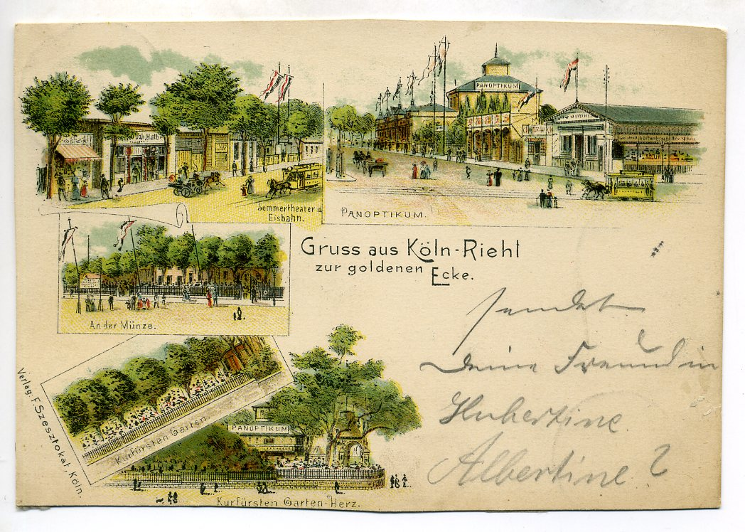 Gruss aus Köln-Riehl -1899 zur Goldenen Ecke Sommertheater u. Eisbahn - Panoptikum - An der Münze- Kurtürsten Garten -Kurfürsten Garten Herz